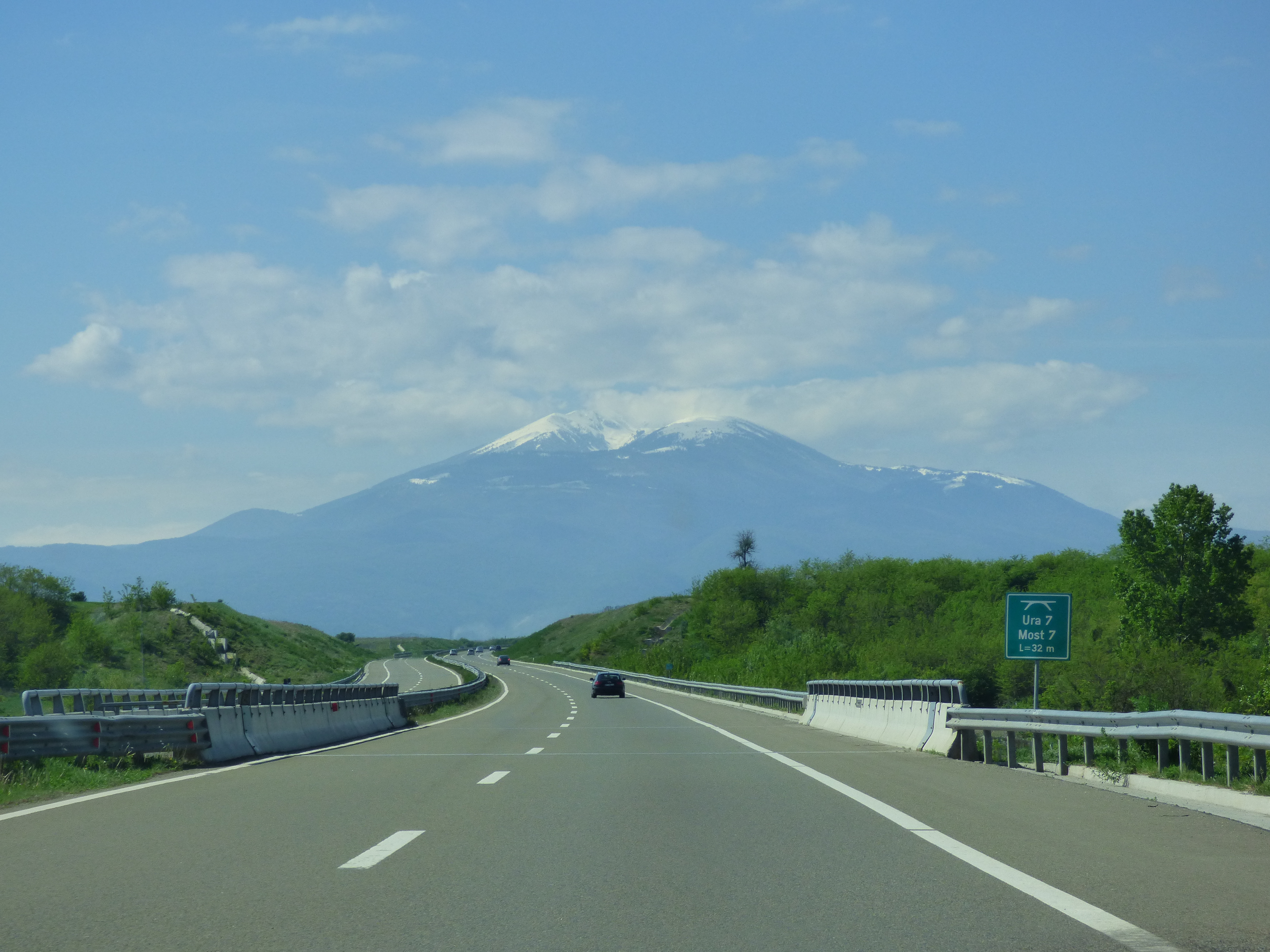 R 7 Kosovo